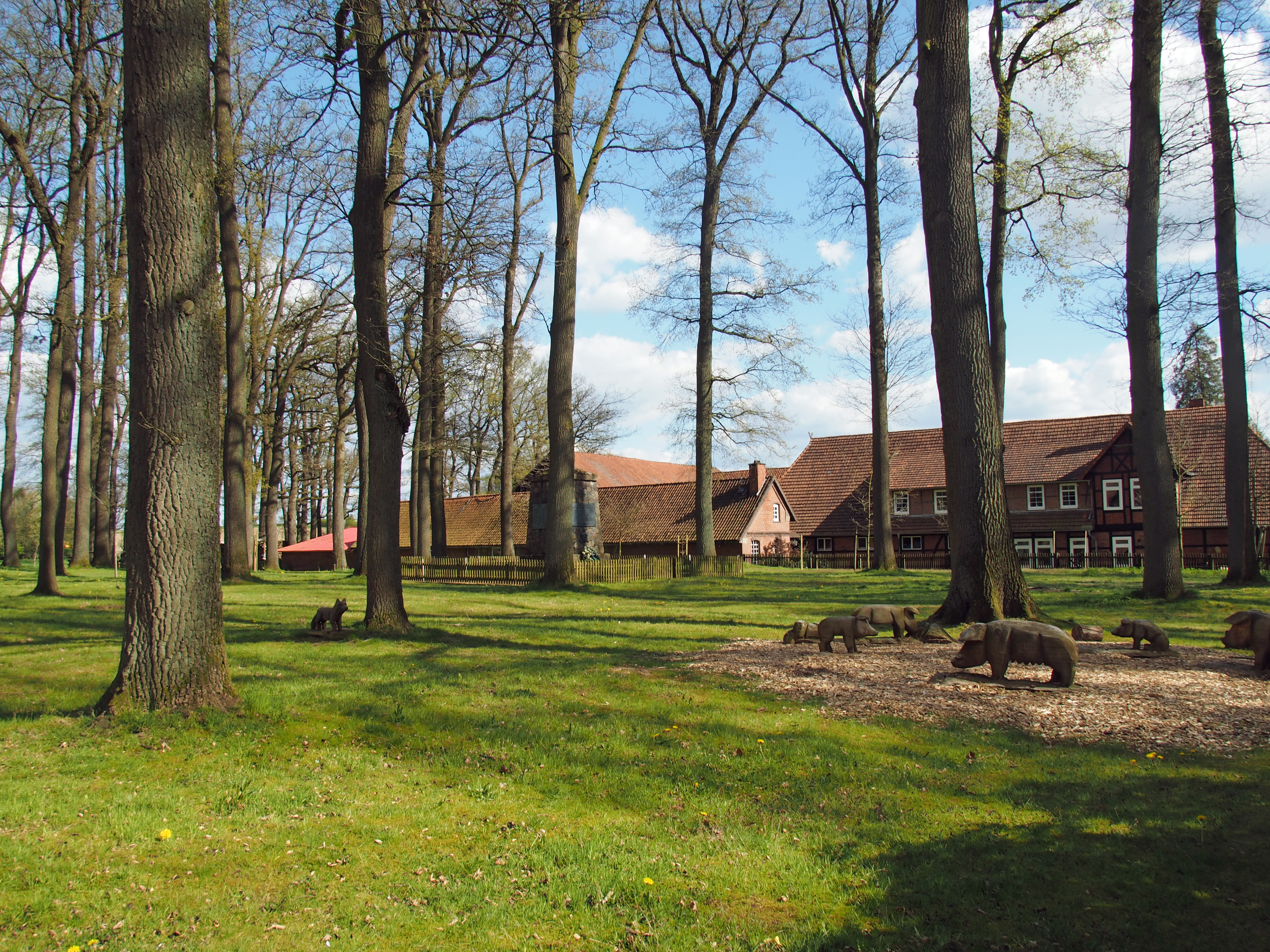 "Die Worth" Dorfplatz mit Eichen (von 1841) in Bleckmar, Stadt Bergen (Landkreis Celle), Niedersachsen, Germany. Die Worth war eine Hofstelle. die im späten Mittelalter Sitz der Billunger und Lehngut der Herzöge von Braunschweig-Lüneburg war. Das Gut wurde erstmals 866 erwähnt.